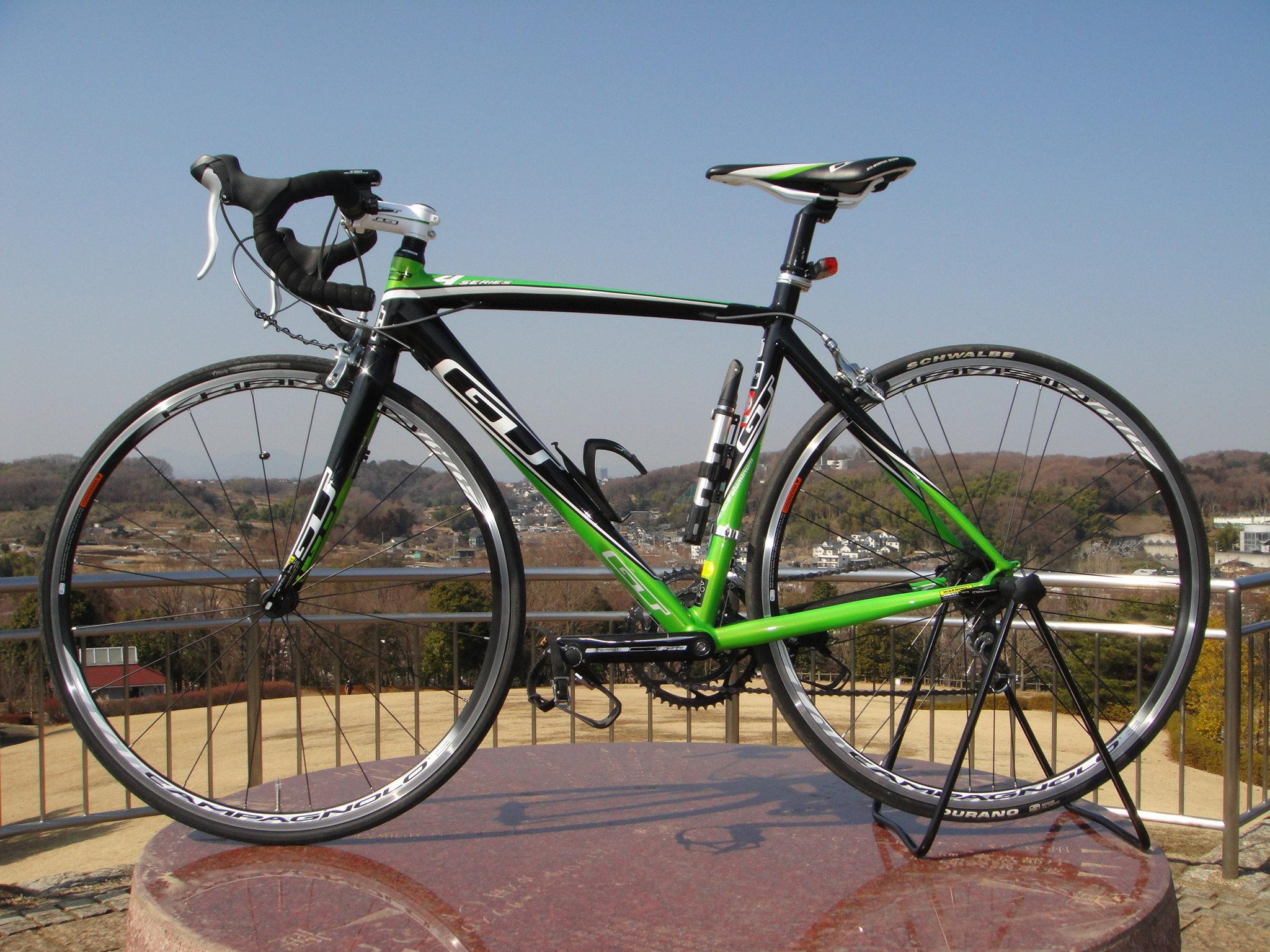 GT bicycles GTR series 4.0 color:Rime and Black